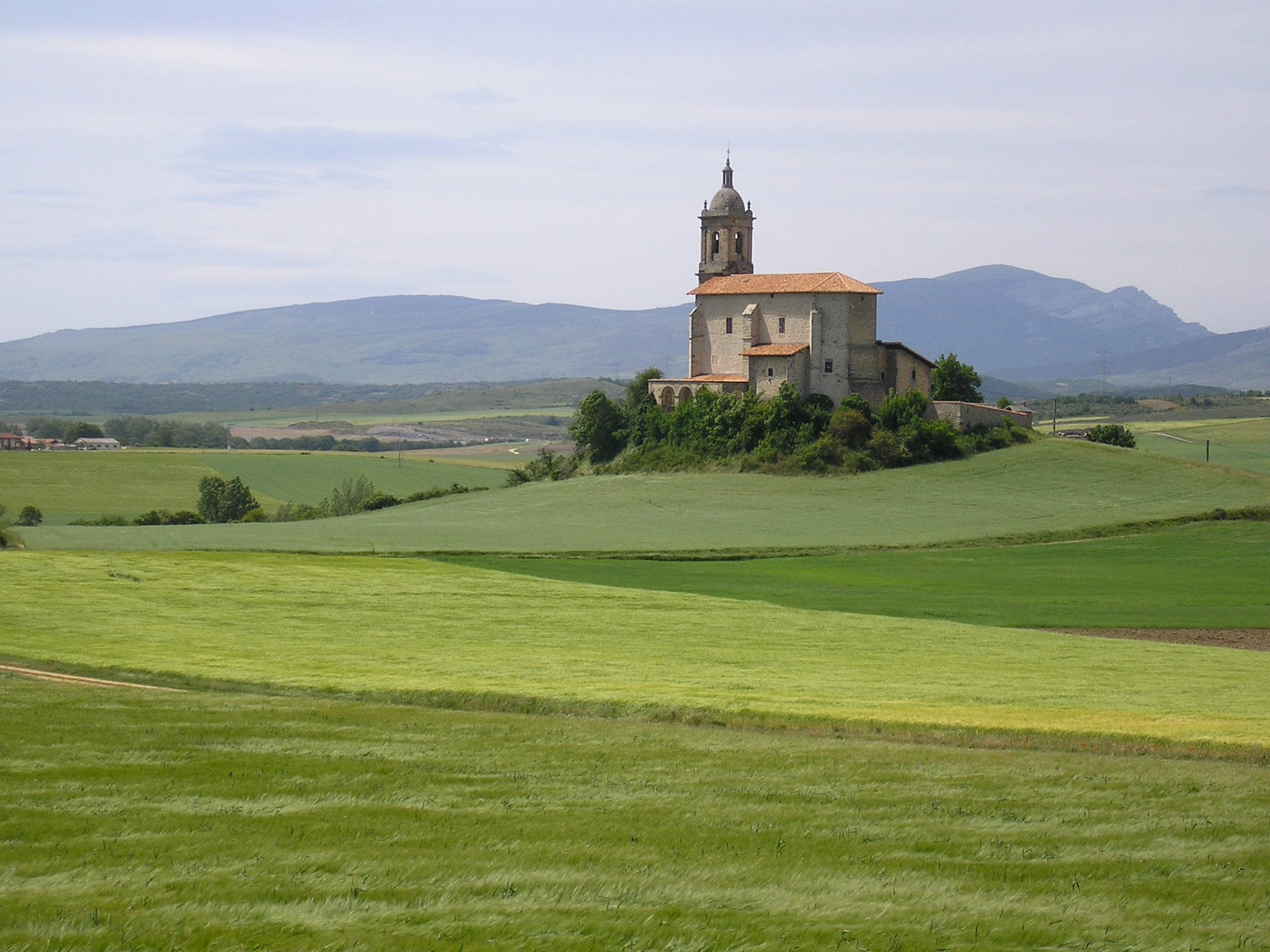 Iglesia de Arroiabe, al fondo el Gorbea